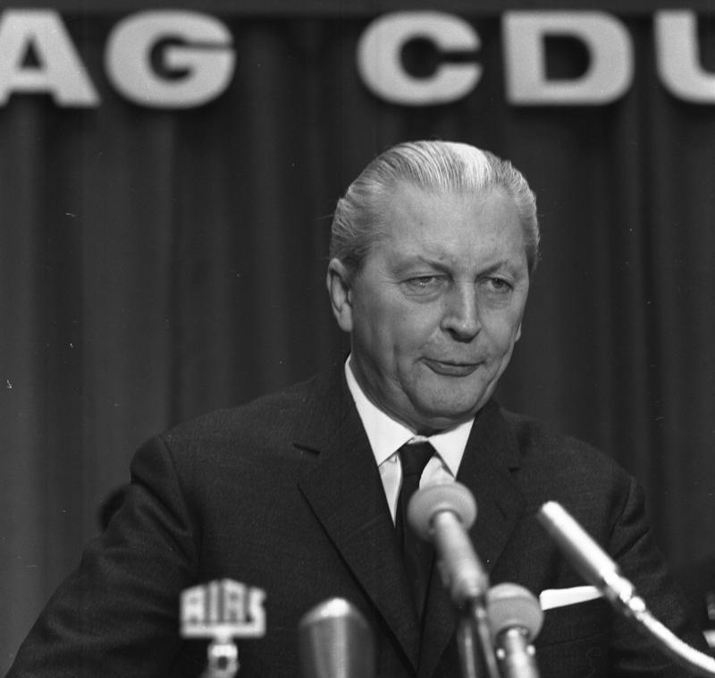 Bundeskanzler Kiesinger auf dem 17. Parteitag der CDU-Rheinland in der Oberhausener Stadthalle